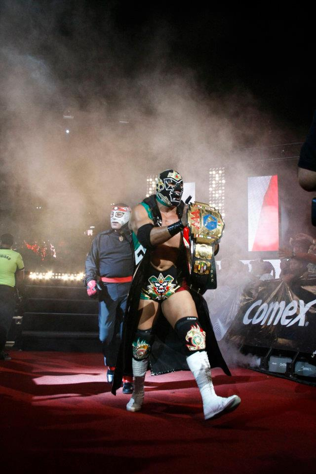 Dr Wagner Jr. Primer Campeon Latinoamericano de la triple A